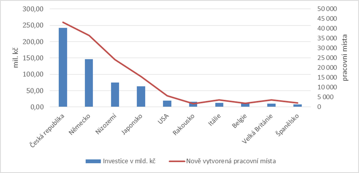 Státy